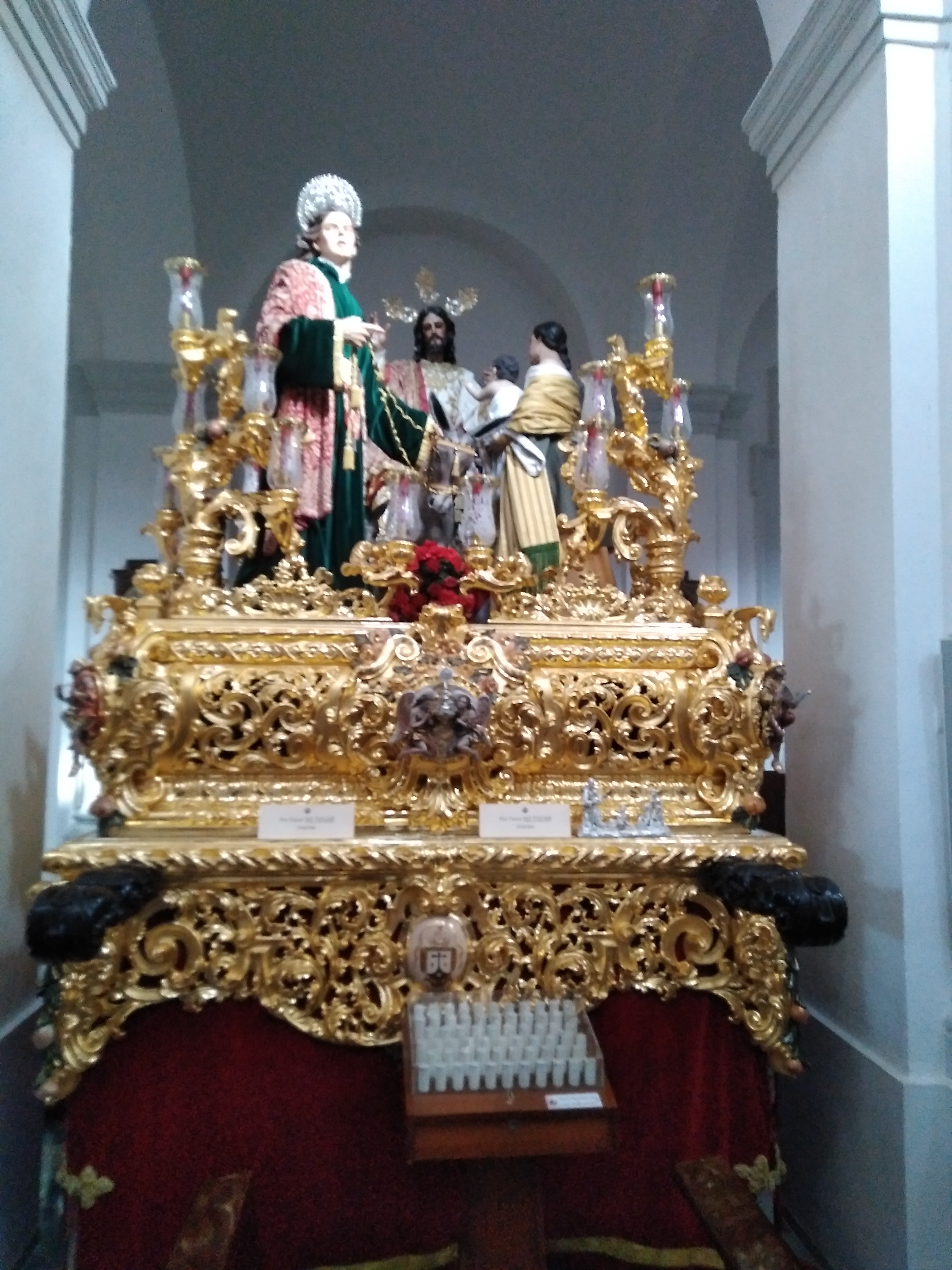 Interior de la parroquia de San José en Cádiz (España)